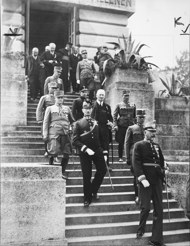 Heldengedenkfeier der Deutschmeister (für die Schlacht bei Sokal 1915). Erzherzog Eugen in der Uniform eines Deutschmeister-Obersten auf den Stufen des Kriegerdenkmals.